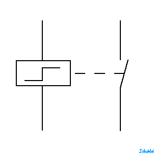 Schaltbild eines Stromstoßschalters mit einem Kontakt